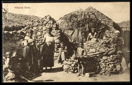 Postal Antigo; São Vicente, Cabo Verde: Ribeira Bote